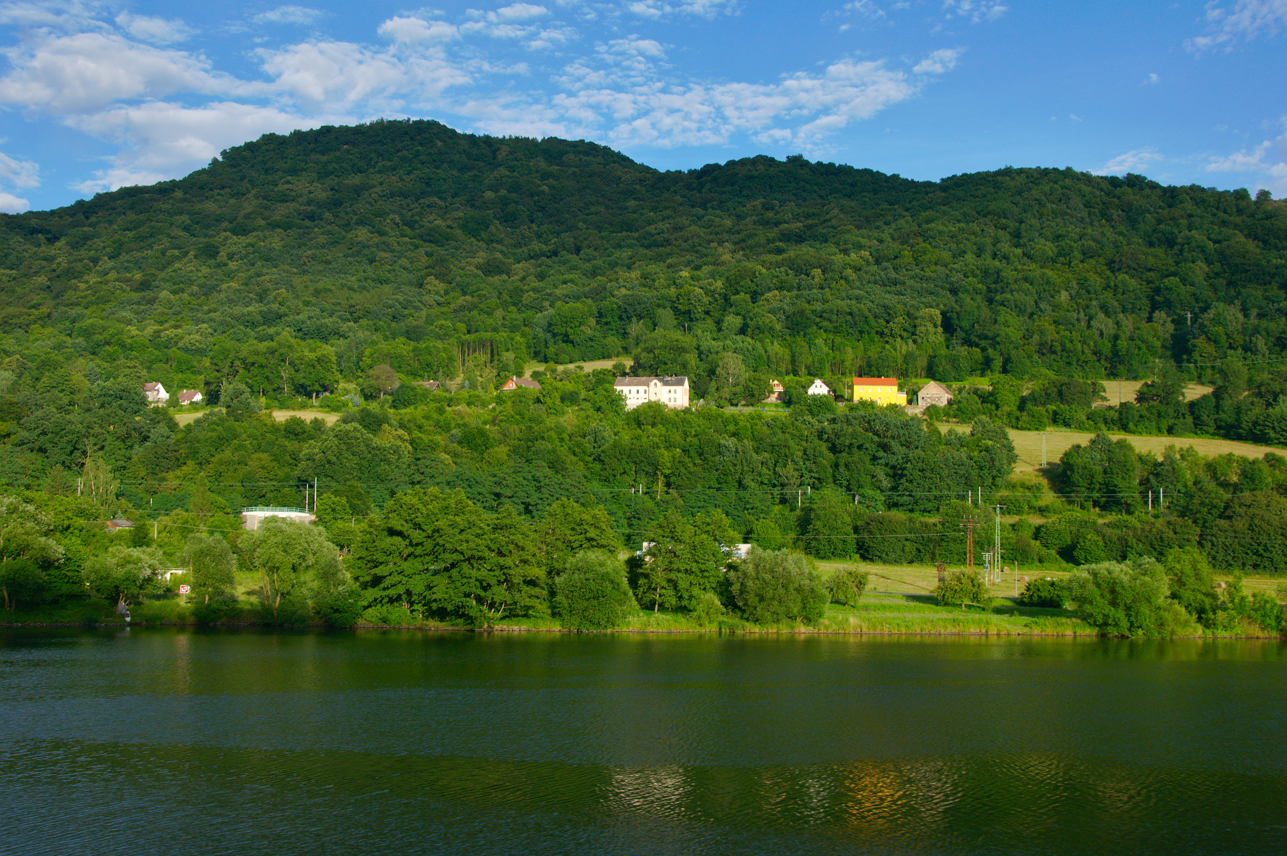 Sebuzín, část města Ústí nad Labem